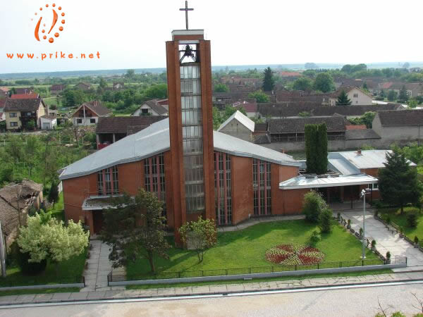 Privlaka: Die Kirche des heiligen Martin